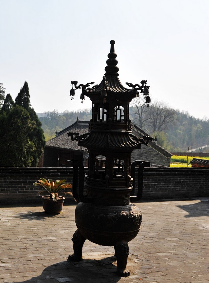 Xichuan